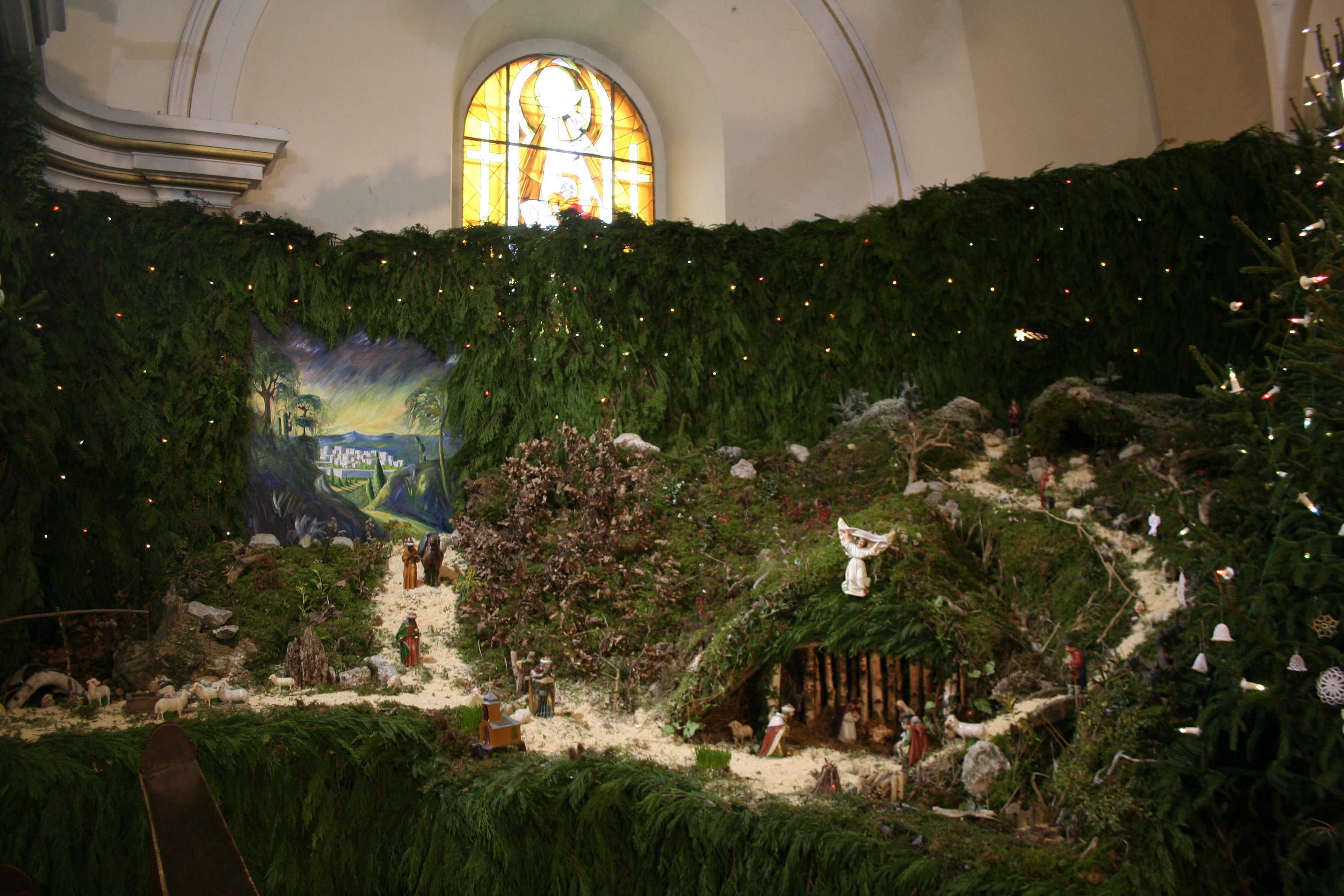 VEGYESBOLT VÖRS MAGYARORSZÁG